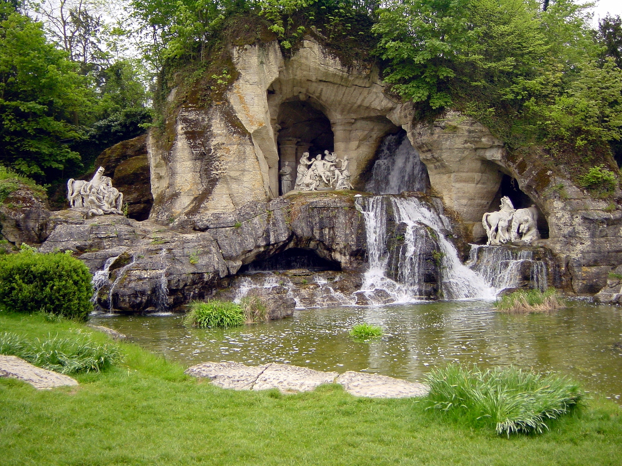 Guérin, Gaspard Marsy et Balthazar Marsy: Bains d'Apollon, groupe sculpté, Bosquet des Bains d'Apollon, parc du château de Versailles, France.